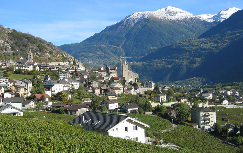 Bildbeschreibung: Ansicht Leuk von Westen Quelle: selbst fotografiert Fotograf/Zeichner: Mario Studer Datum: 2005-10-09